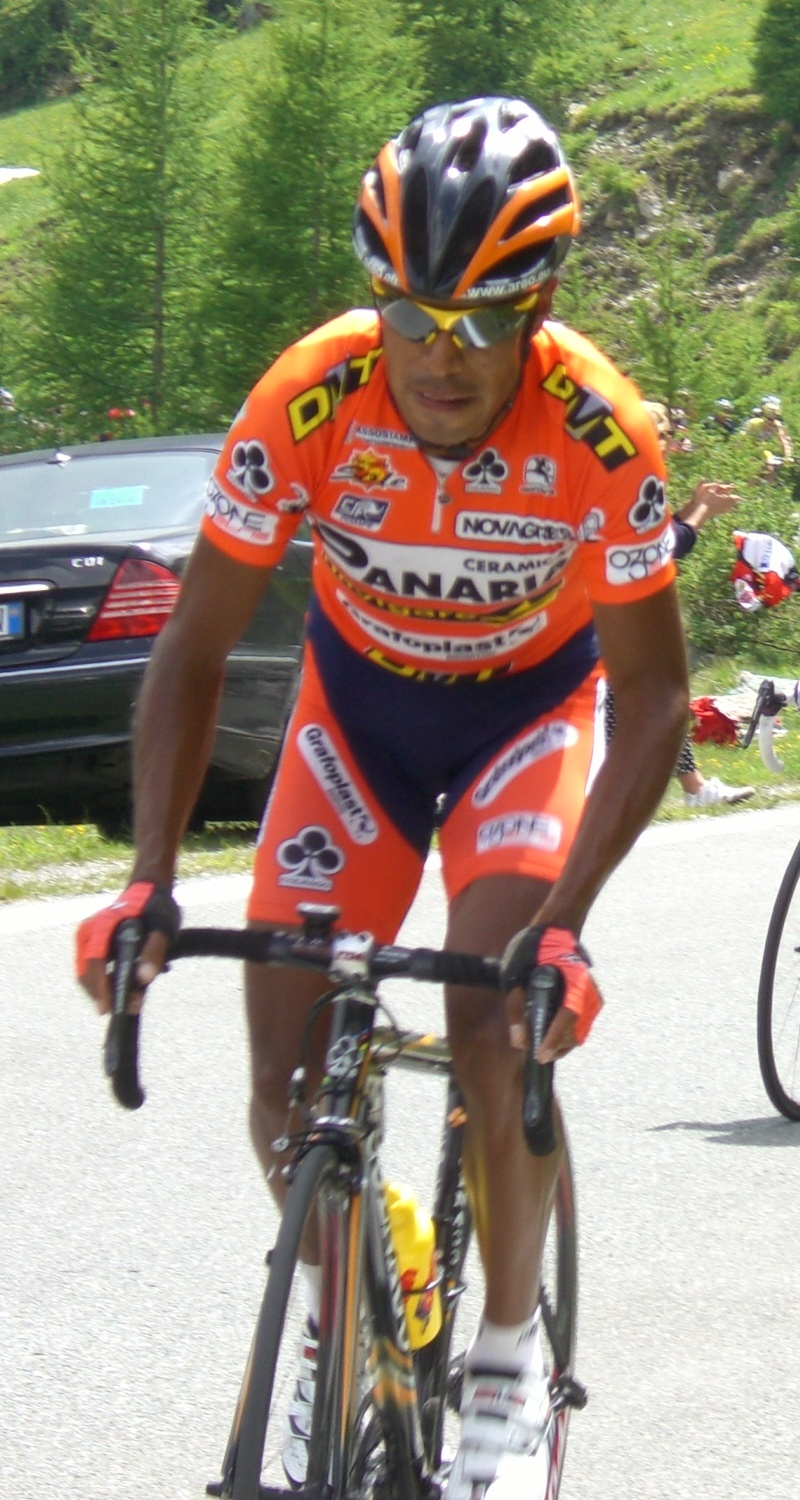 Julio Alberto Perez Cuapio sul Colle dell'Agnello al Giro d'Italia 2007